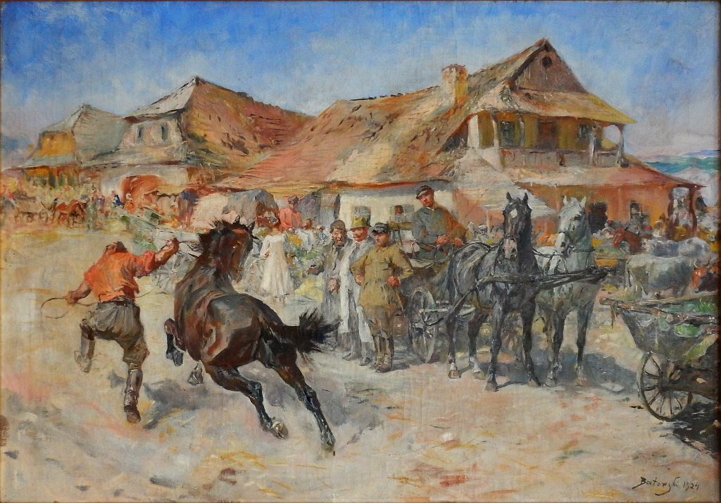 Reprodukcja obrazu "Spłoszony koń" Stanisława Kaczora-Batowskiego z 1924r. Wymiary w świetle ramy: 55 x 79 [cm]